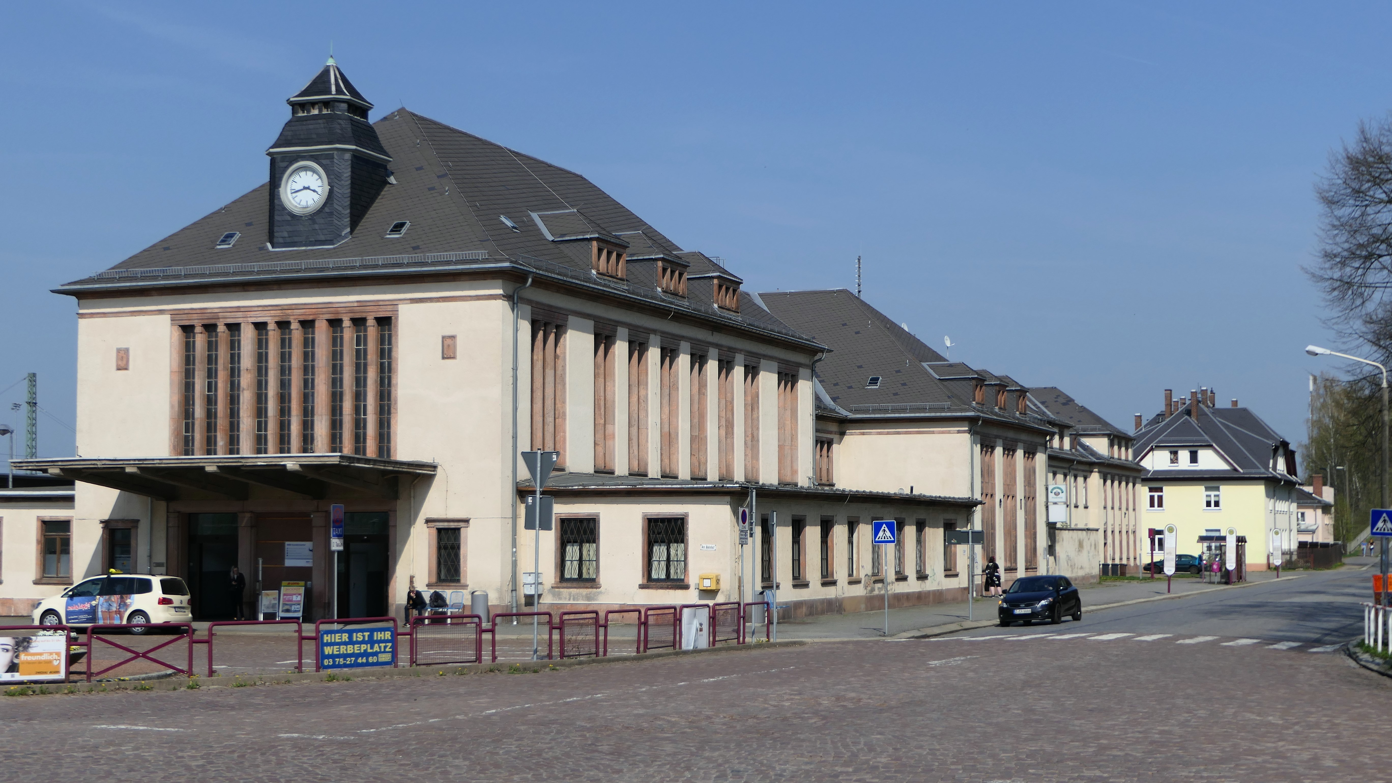 Bahnhofsempfangsgebäude, Rosa-Luxemburg-Straße 3, Glauchau